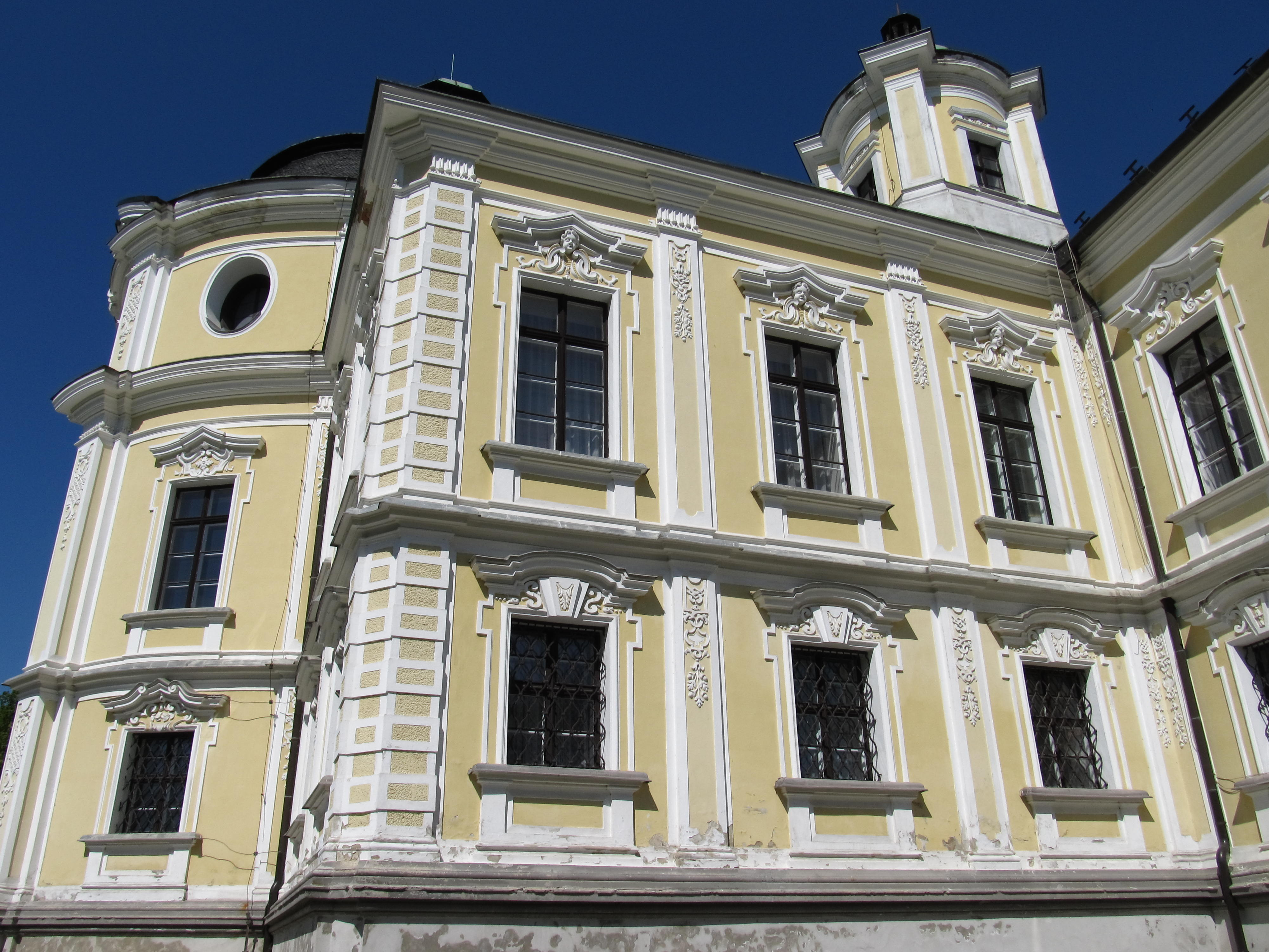 Detail fasády jižního průčelí